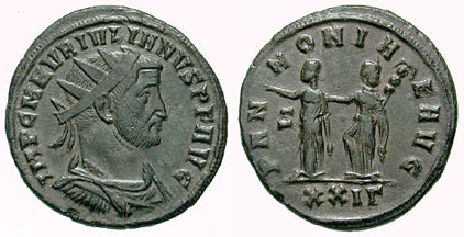 Giuliano. 284. Æ Antoniniano (3.70 gm). Zecca di Siscia.